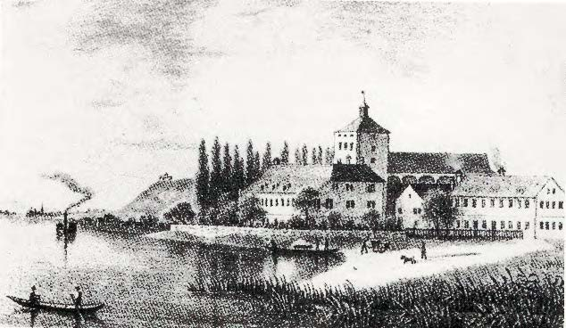 Die Burg Oberstaad bei Öhningen am Untersee (Bodensee). Gemälde (Maler unbekannt); um 1830